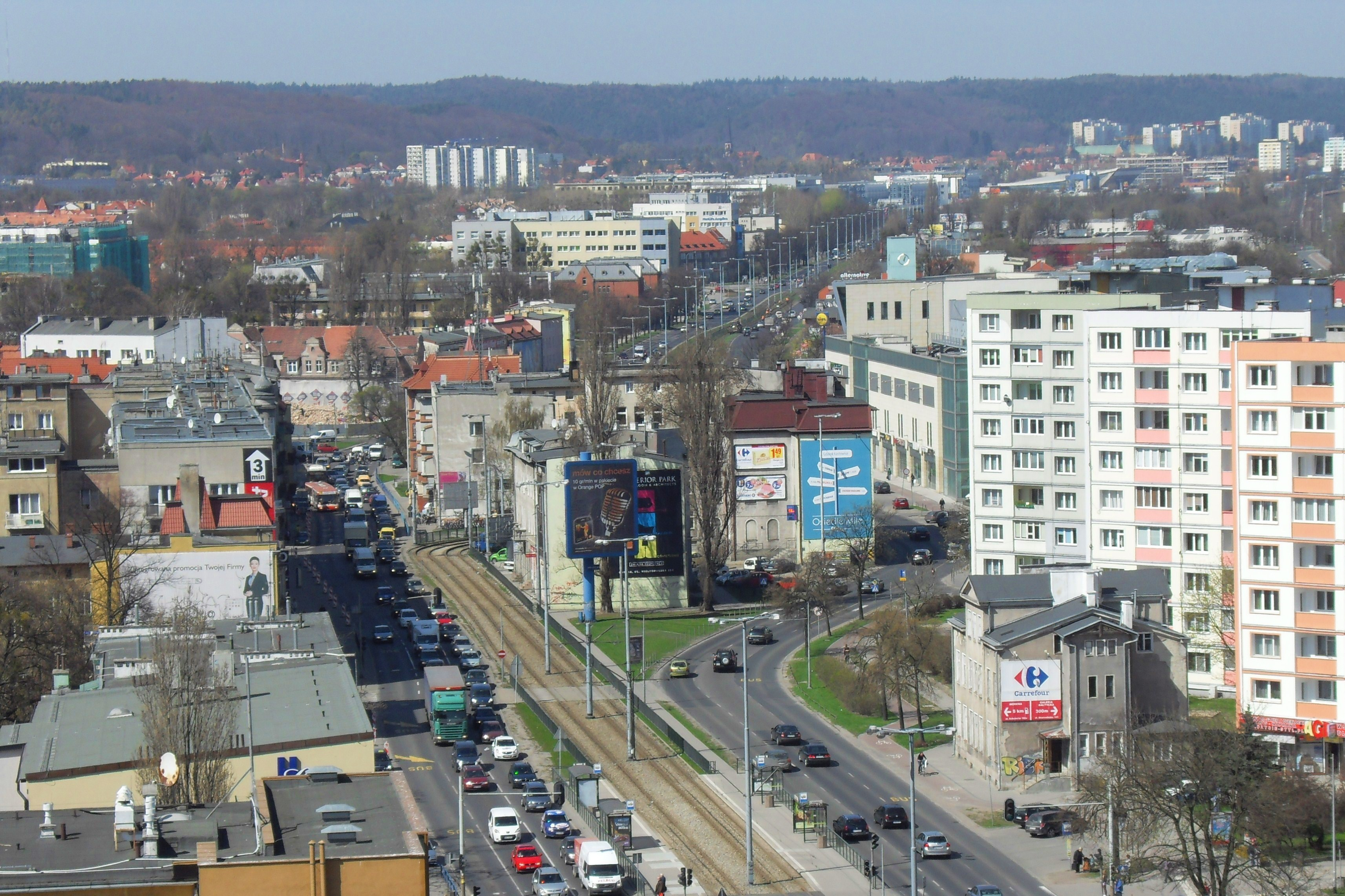 Gdańsk Wrzeszcz. Aleja Grunwaldzka, rozwidlenie jezdni, w środku tzw. "Wysepka". Widok w kierunku Gdyni.